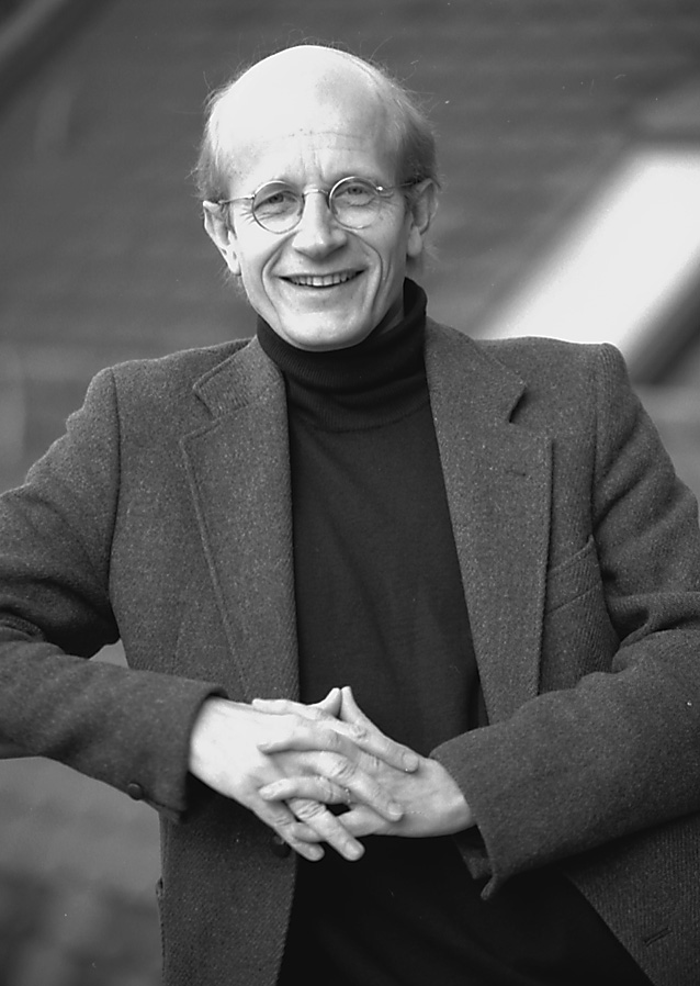 Klaus Angermann ist Musikwissenschaftler. Seit 2008 ist Klaus Angermann Chefdramaturg des Musiktheater Dortmund